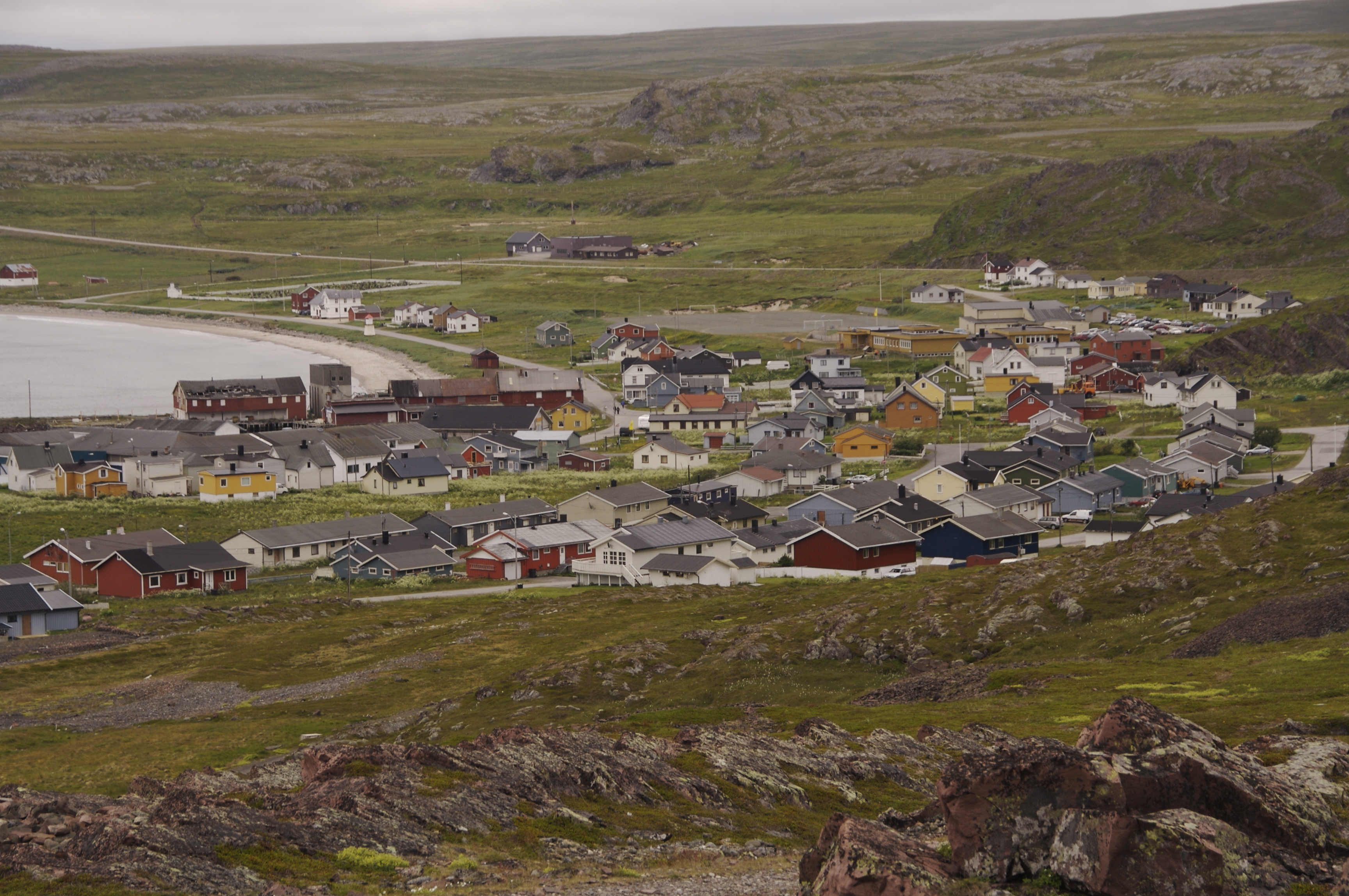 The village Kiberg in Vardø, Finnmark, Norway.